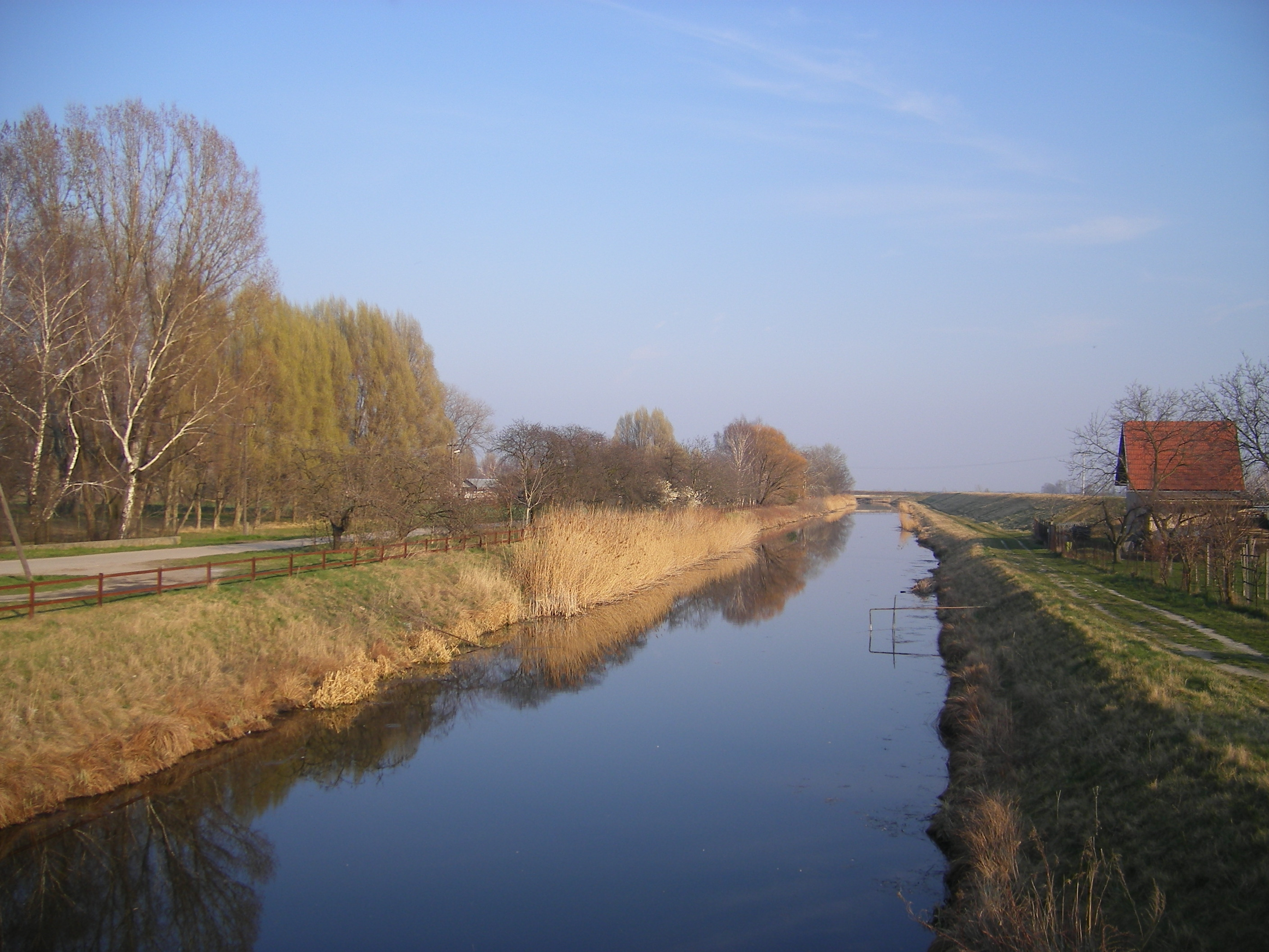 Zsemlékes - a kanális